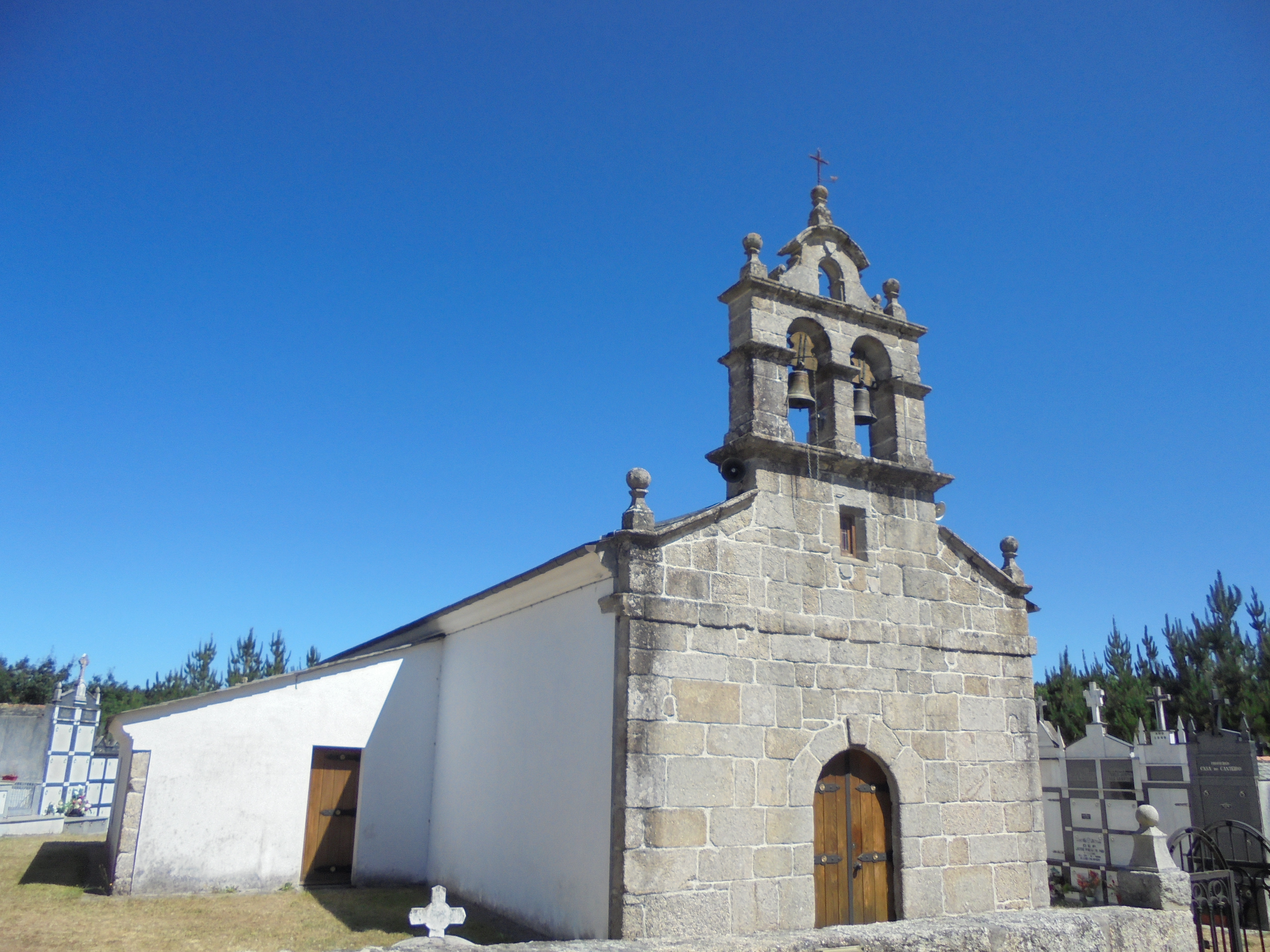 Igrexa parroquial de Teixeiro ( Lugo)